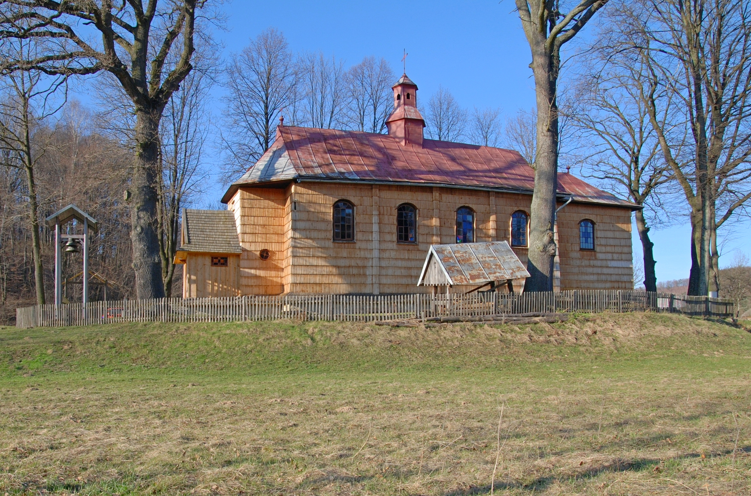 wieś Lalin